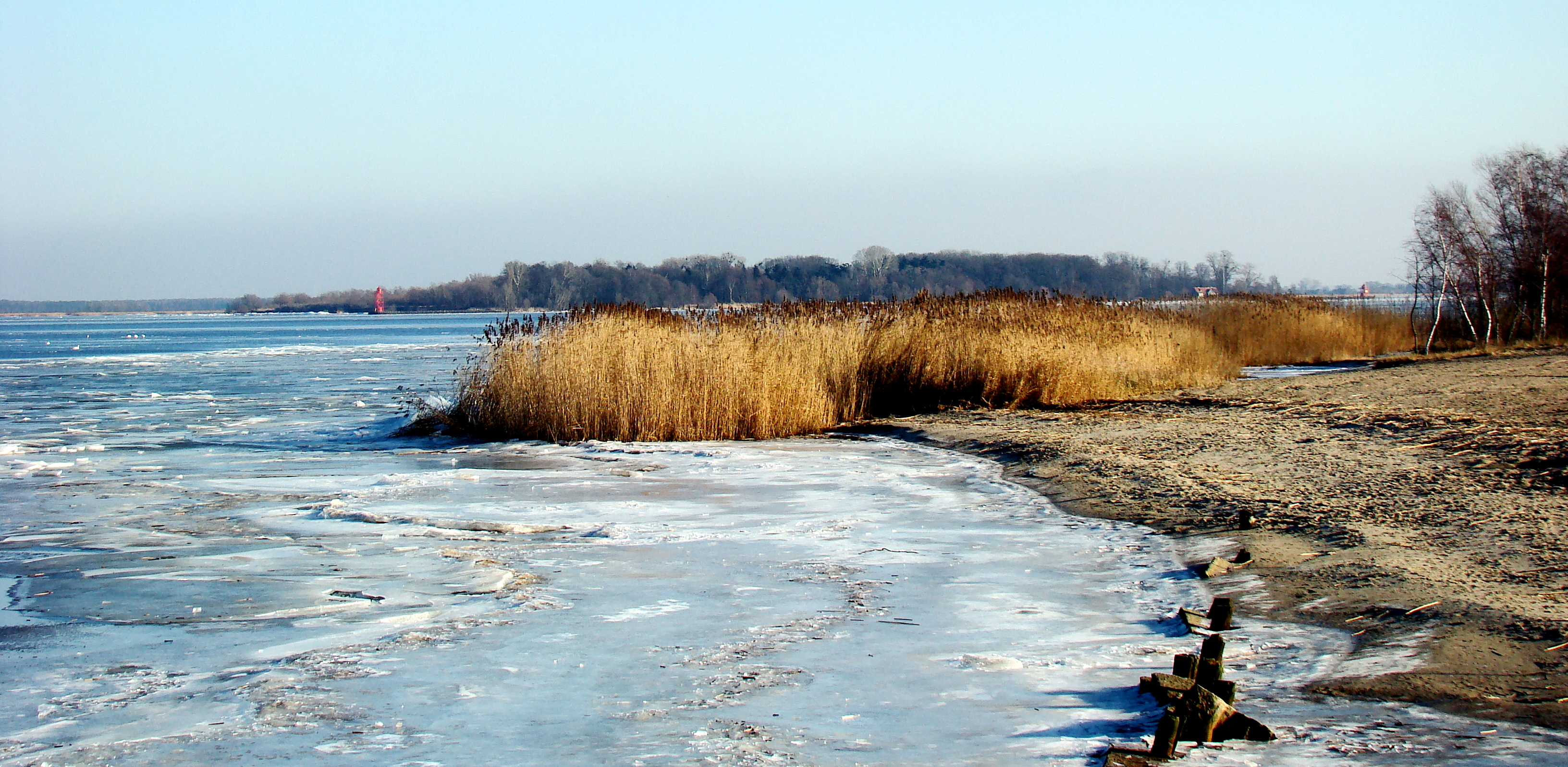 Zalew Szczeciński, zachodni brzeg w tle wyspa Chełminek, (Województwo zachodniopomorskie), Polska